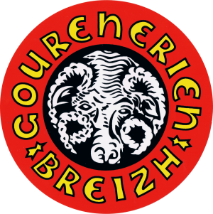 logo ar gourenerien breizh